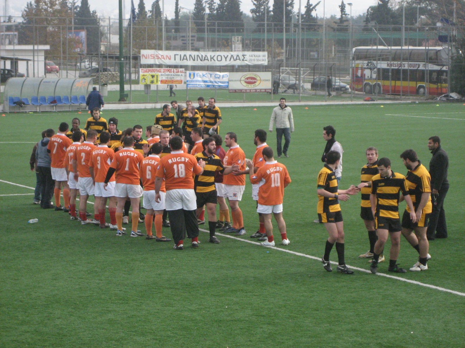 Match de championnat grec entre deux équipes de Thessalonique.